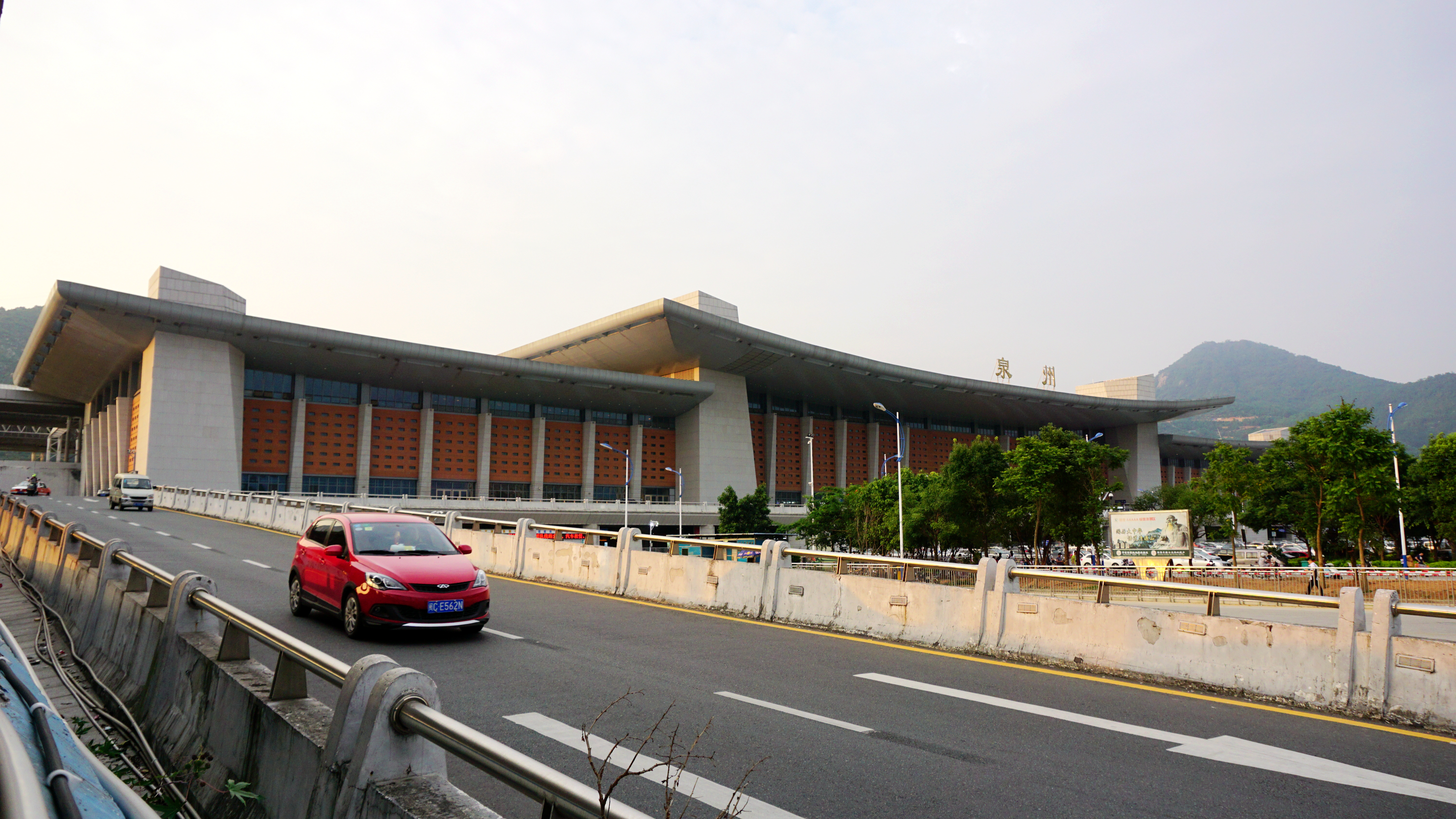 泉州火车站（出站匝道视角）